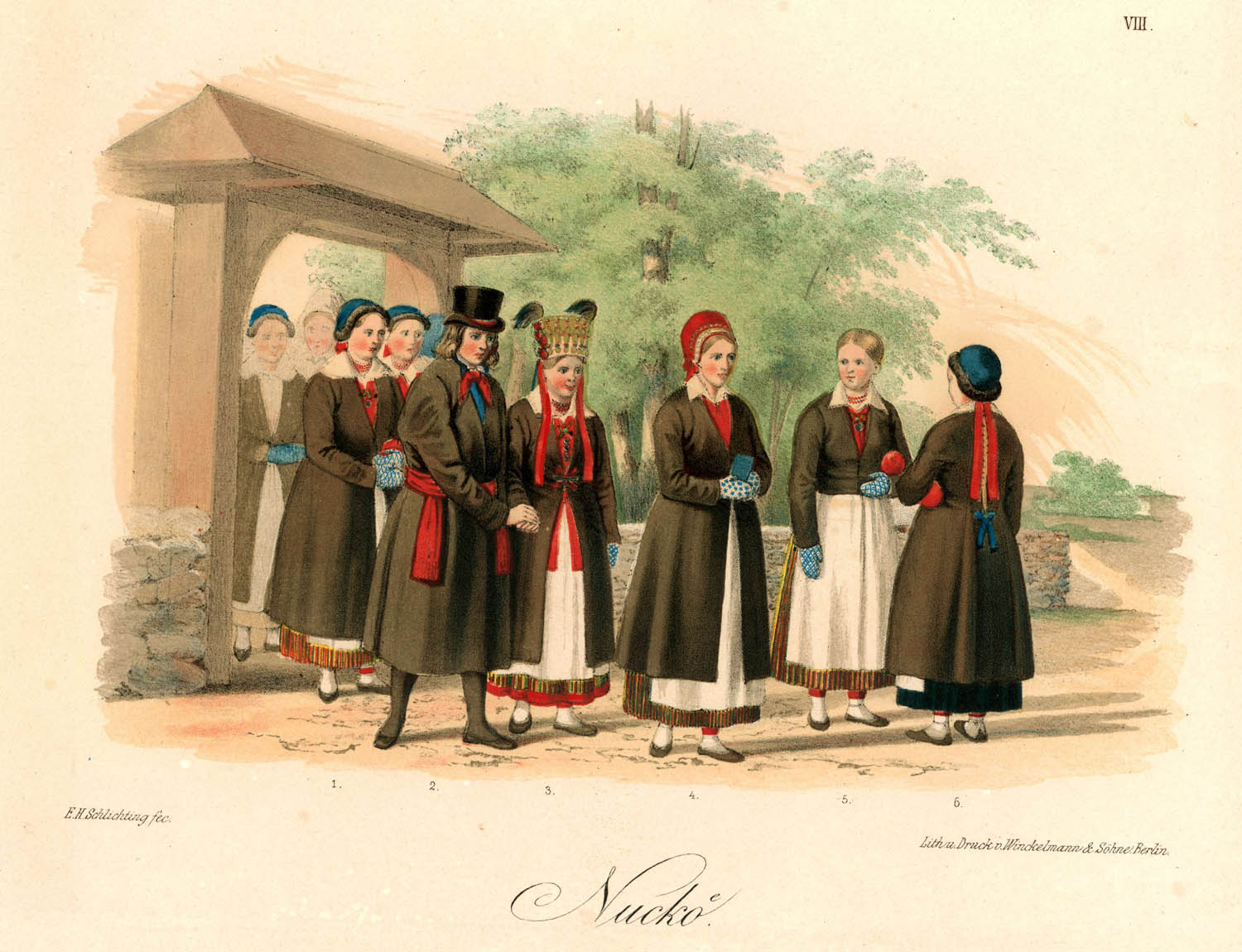 Folkdräkt, Nuckö, Estland. Litografi av E. H. Schlichting. "Lith.u. Druck v. Winckelmann & Söhne. Berlin"